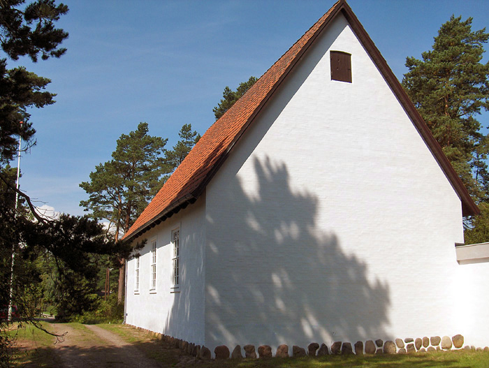 fra sydvest